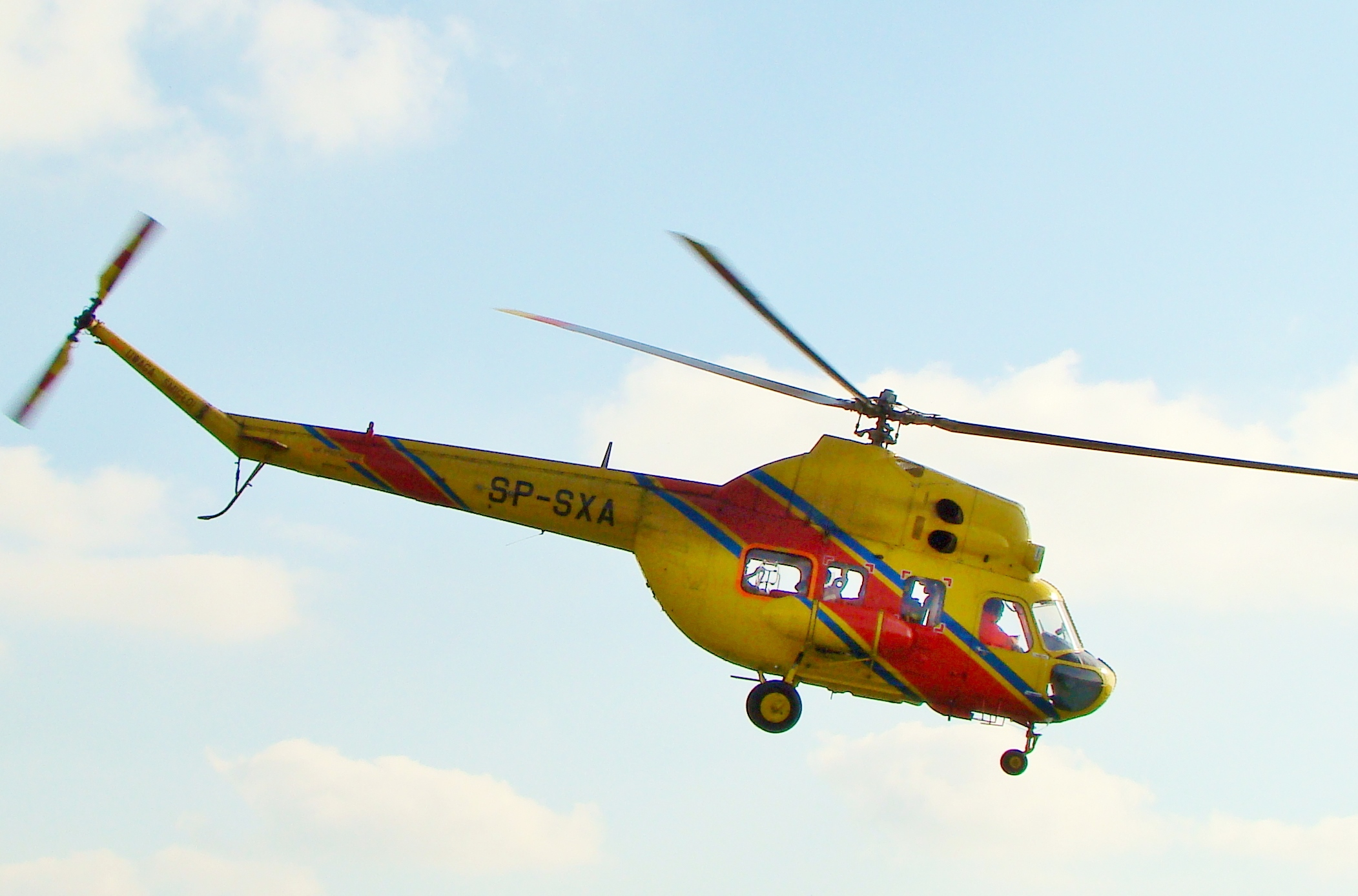 LPR - śmigłowiec n.b. SP-SXA w Gorzowie Wlkp.